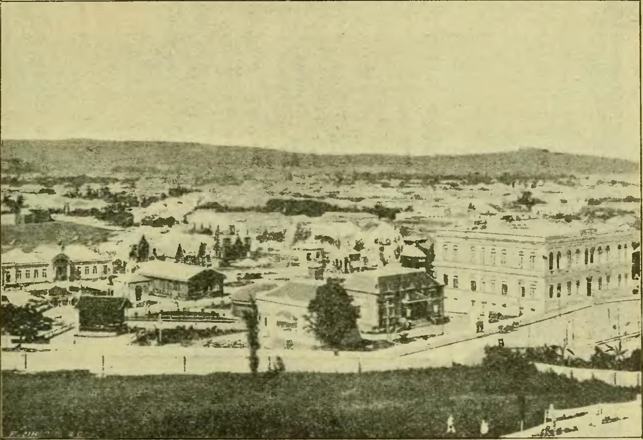 Porto Alegre, capital do Rio Grande do Sul